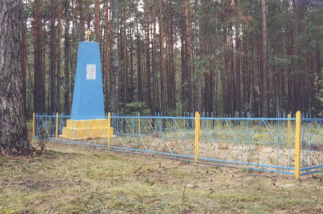 Памятник евреям поселка Козловщина Дятловского района Гродненской области, убитым нацистами в 1941 году.